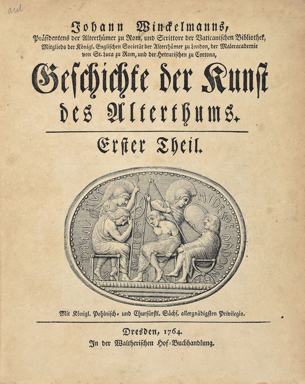 Titelseite von: Johann Joachim Winckelmann: Geschichte der Kunst des Altertums. Dresden: Walther, 1764. Mit einem Stich des sog. Stosch'schen Steins, eines etruskischen Skarabäus aus dem 5. Jahrhundert v. Chr.